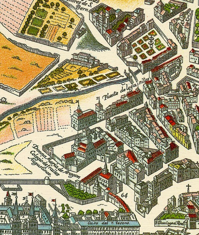 Detalle de la plancha izquierda de 'La Villa de Madrid Corte de los Reyes Católicos de Espanna'; se aprobó su impresión en septiembre de 1622 y se realizó en 1623. El plano, «dibujado en perspectiva caballera», en la reedición del grabador holandés Frederic de Witt, hacia 1635.(Plano (1622-1635) de Antonio Mancelli. Versión coloreada del original digitalizado por la Biblioteca nacional de España)